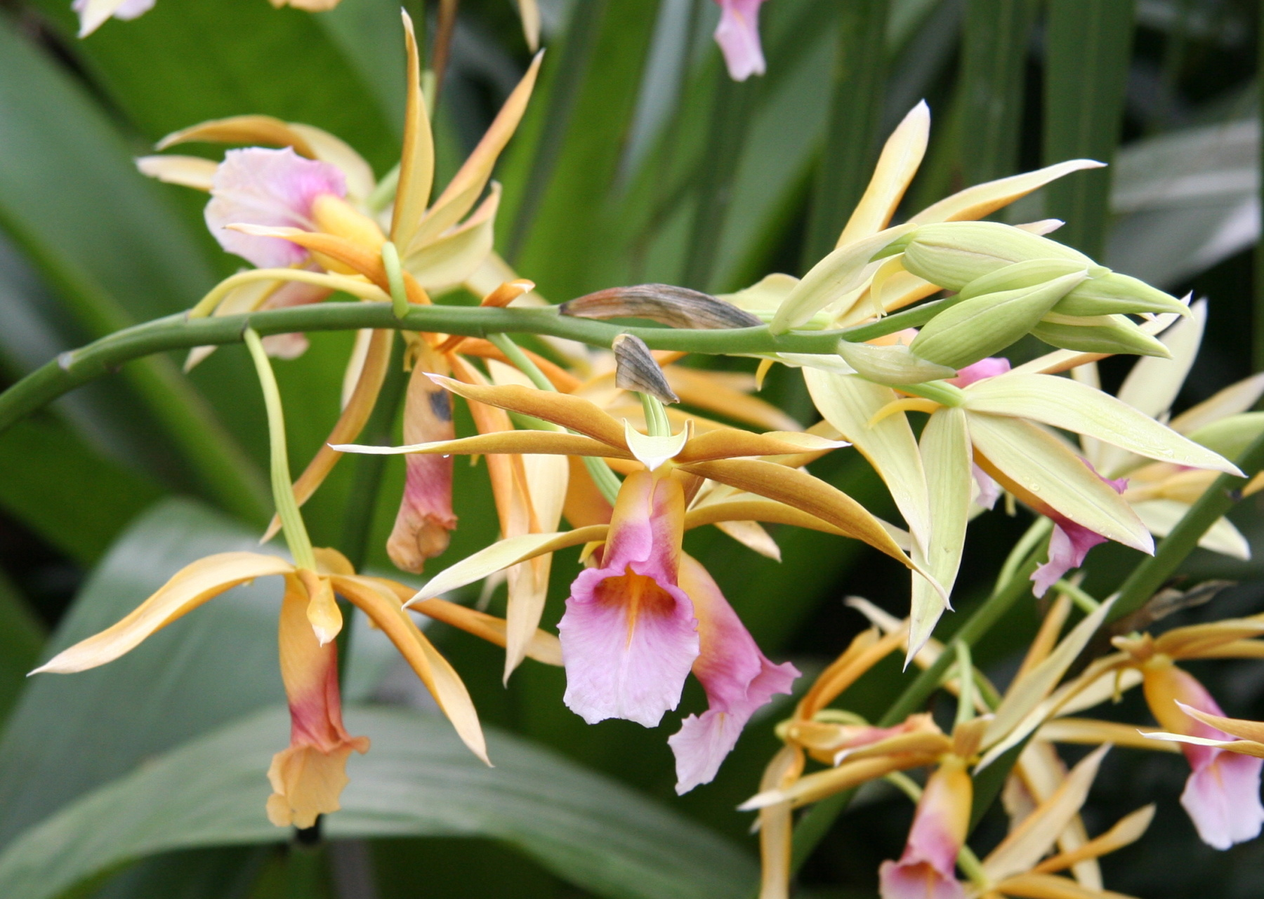 Phaius tancarvilleae im Botanischen Garten Dresden